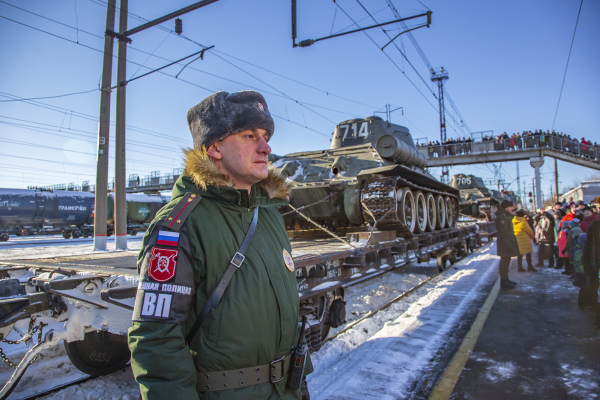 Ветераны ВОВ встречали танки Т-34 в городе Муром